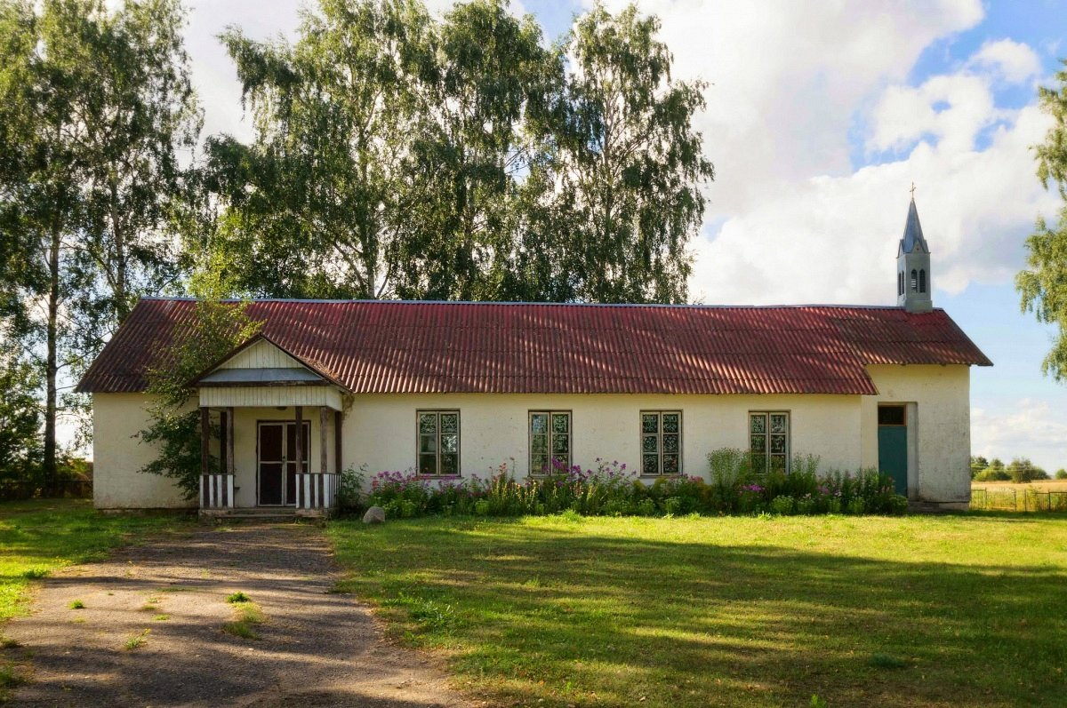 Папшычы. Касцёл